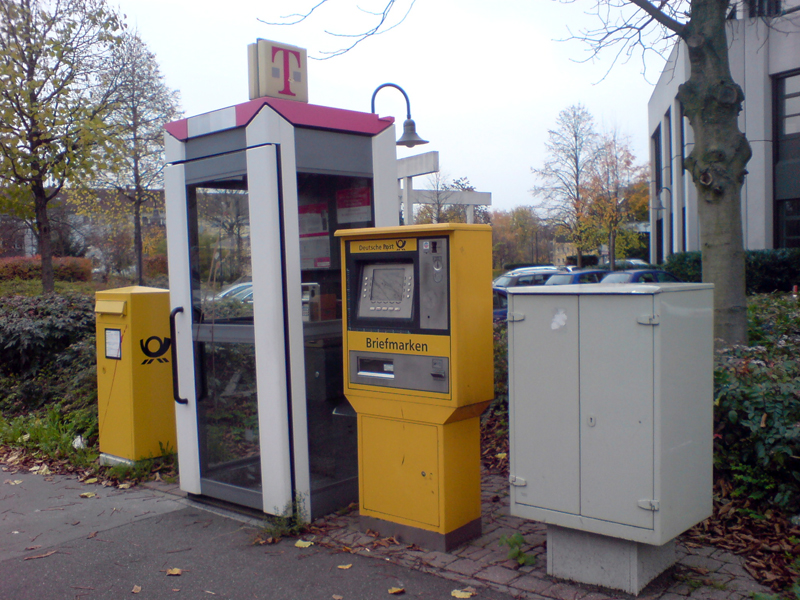 Von links nach rechts: Briefkasten, Telefonzelle, Briefmarkenautomat und ein Postablagekasten in Wiesbaden, Dostojewskistraße